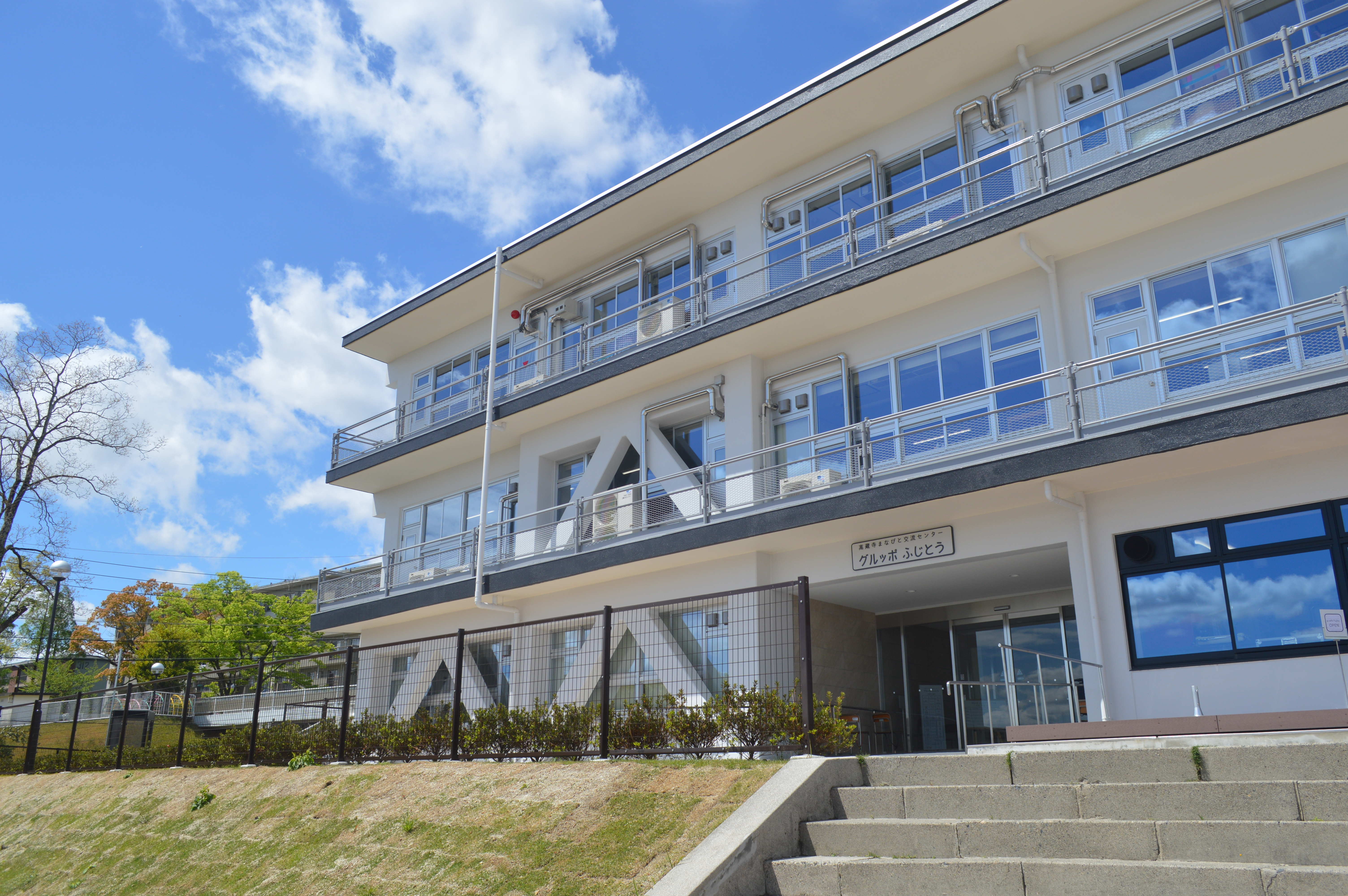 愛知県春日井市にある「グルッポふじとう」。